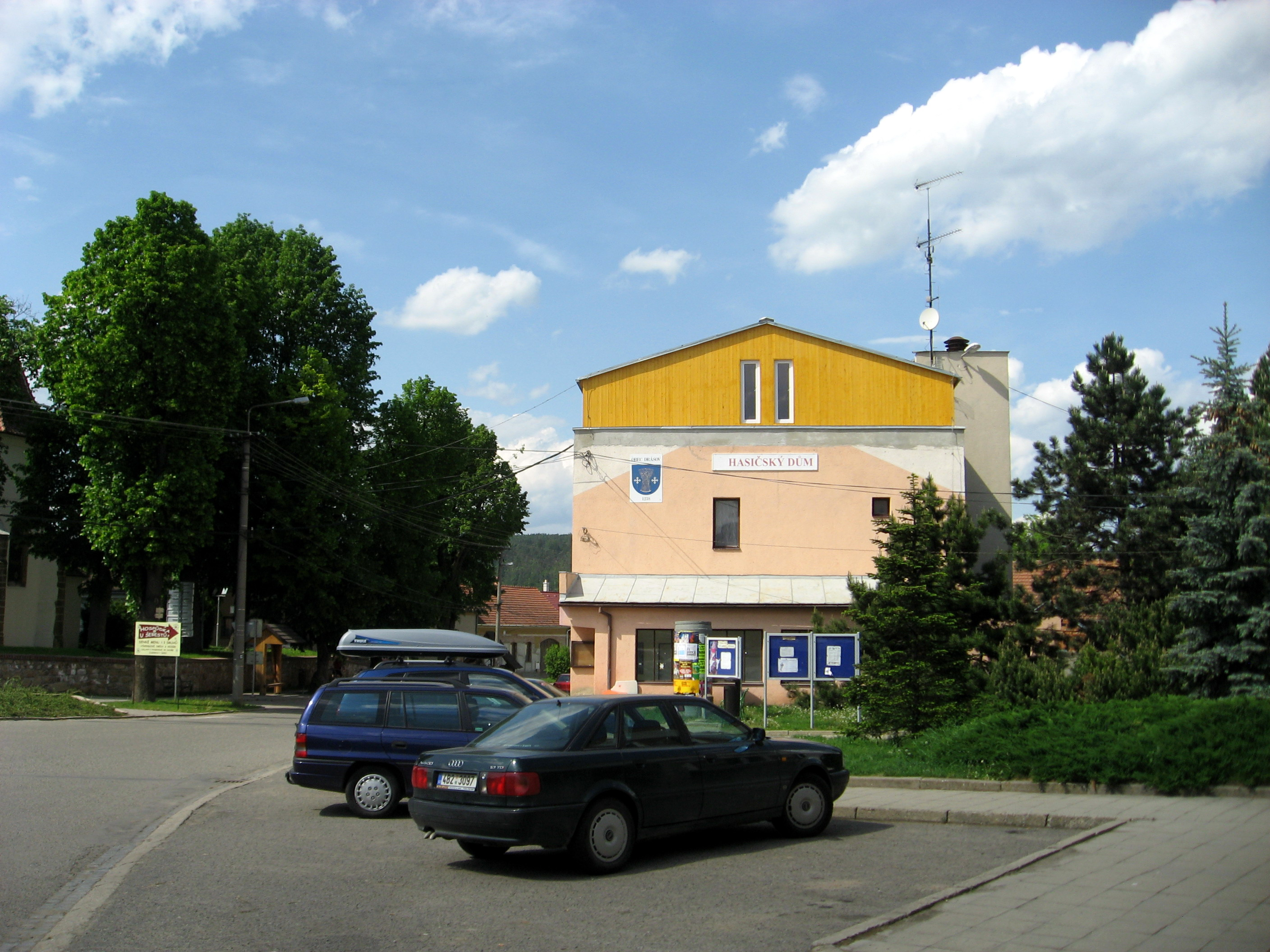 Drásov, Hasičský dům